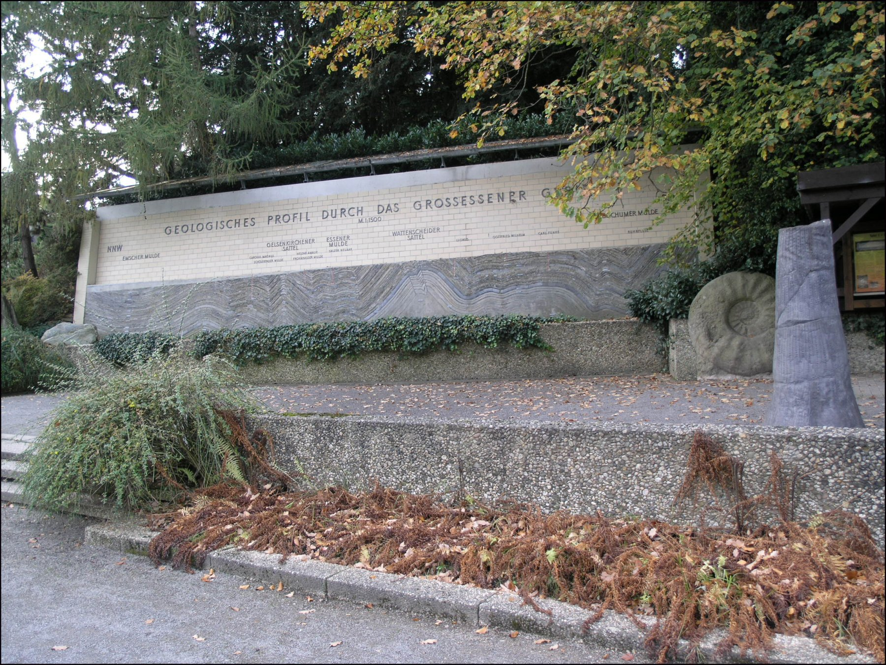 Grugapark (Essen, Germany)